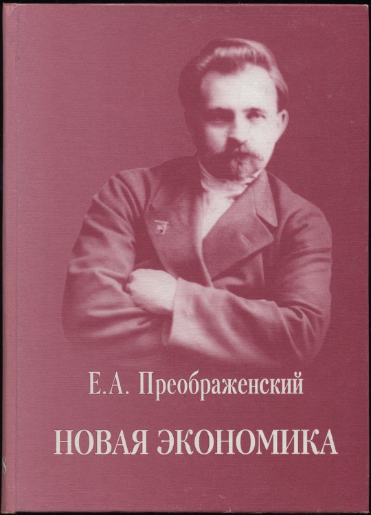 Преображенский - Новая экономика (обложка книги, 2008)